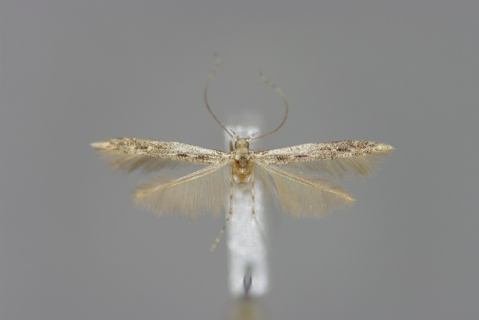 Batrachedra praeangusta, Männchen